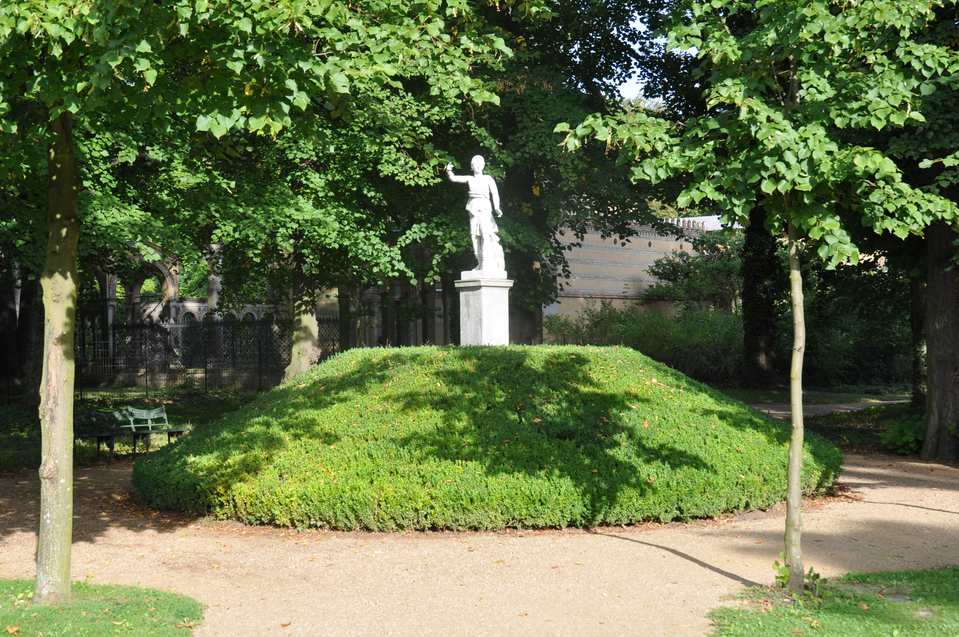 das Diana- oder Pliniusbeet am Casino zu Klein-Glienicke, 2012